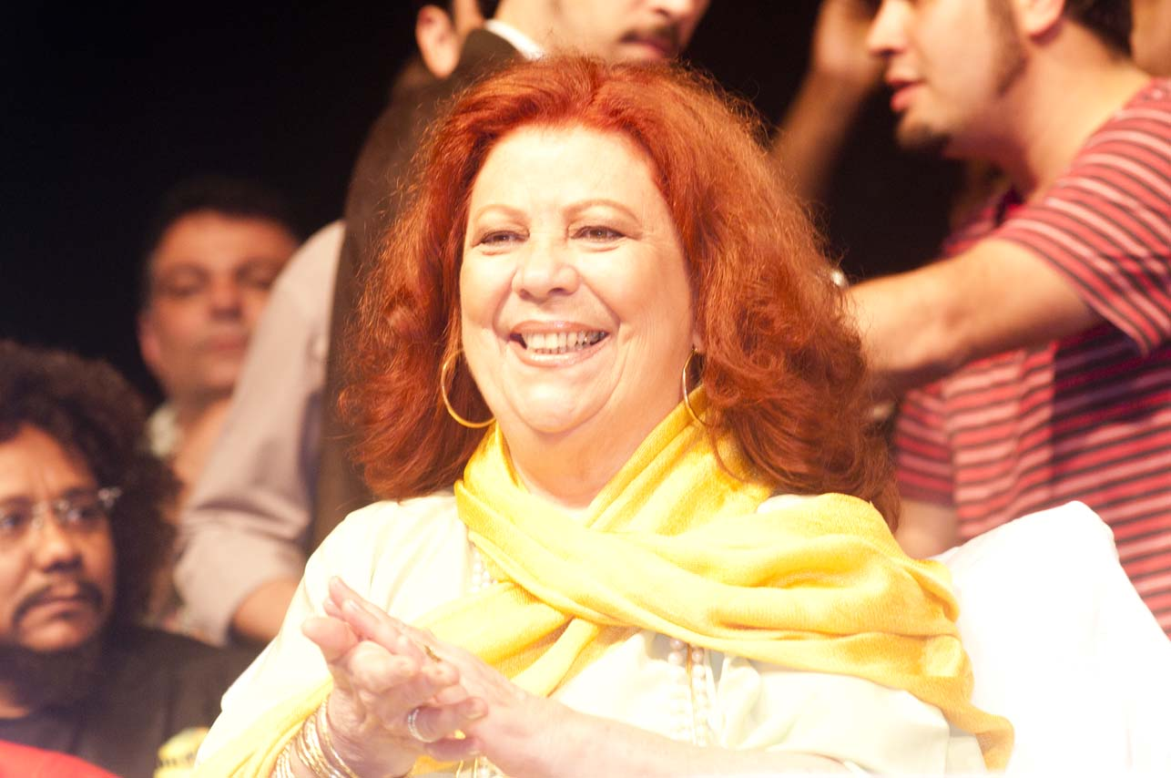 (Fotos Ivone Perez) Evento Pró Dilma - Rio de Janeiro 18/10/10.